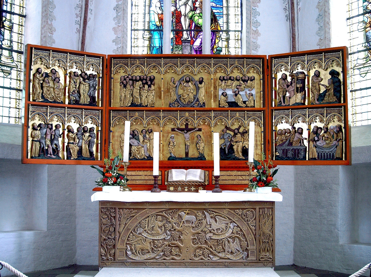 St.-Nikolai-Kirche in Burg (Fehmarn). Der gotische dreiflügelige Hauptaltar stammt aus der zweiten Hälfte des 14. Jahrhunderts. Der Künstler ist unbekannt.